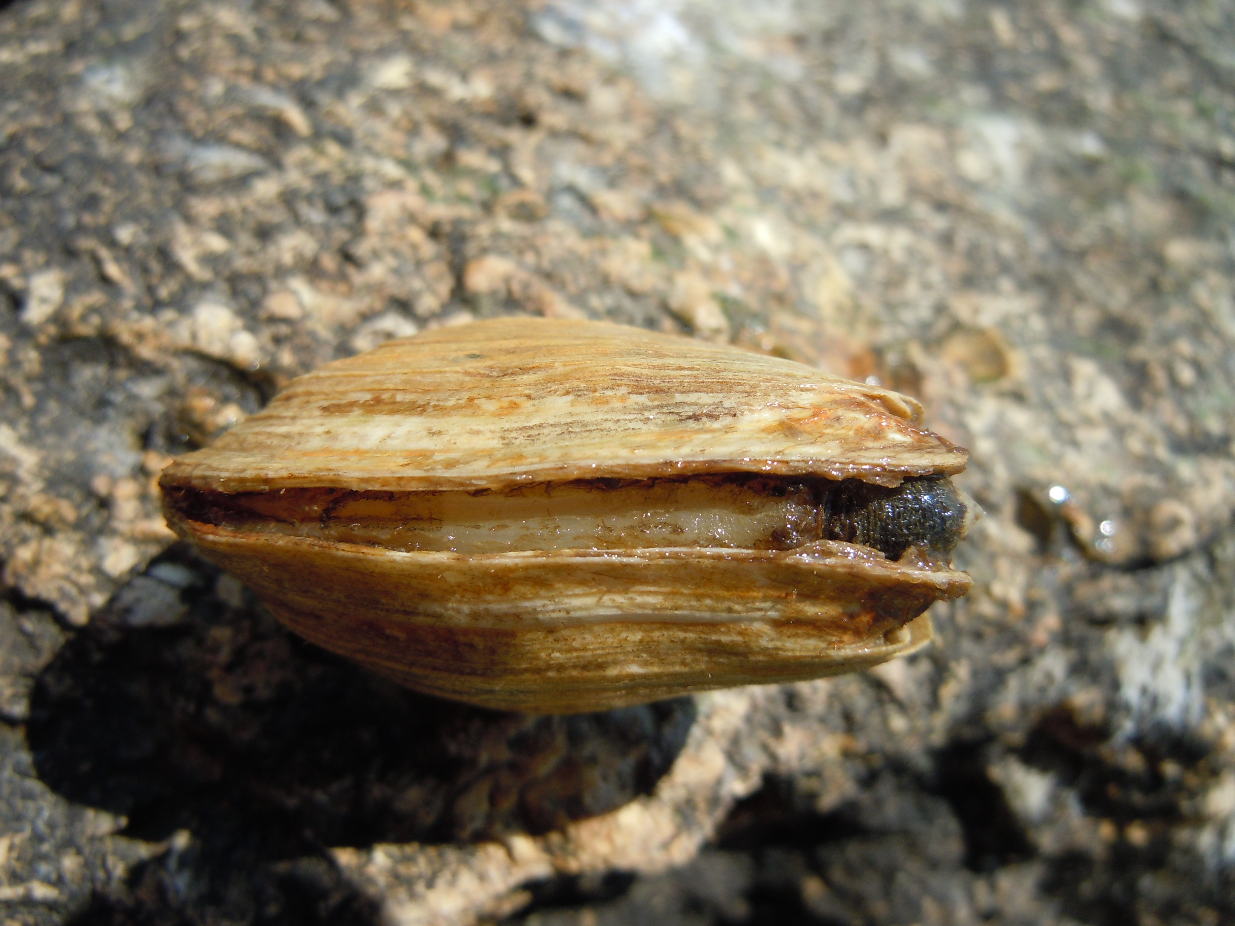 Mya arenaria з Григорівського лиману